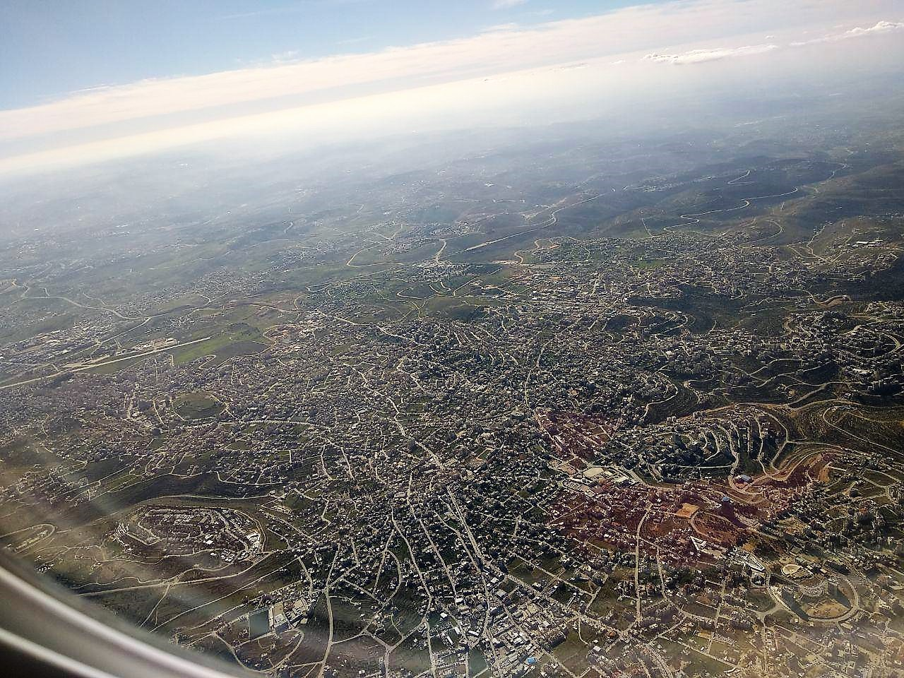 צילום אוויר של אל בירה, בפינה השמאלית התחתונה ההתנחלות פסגות